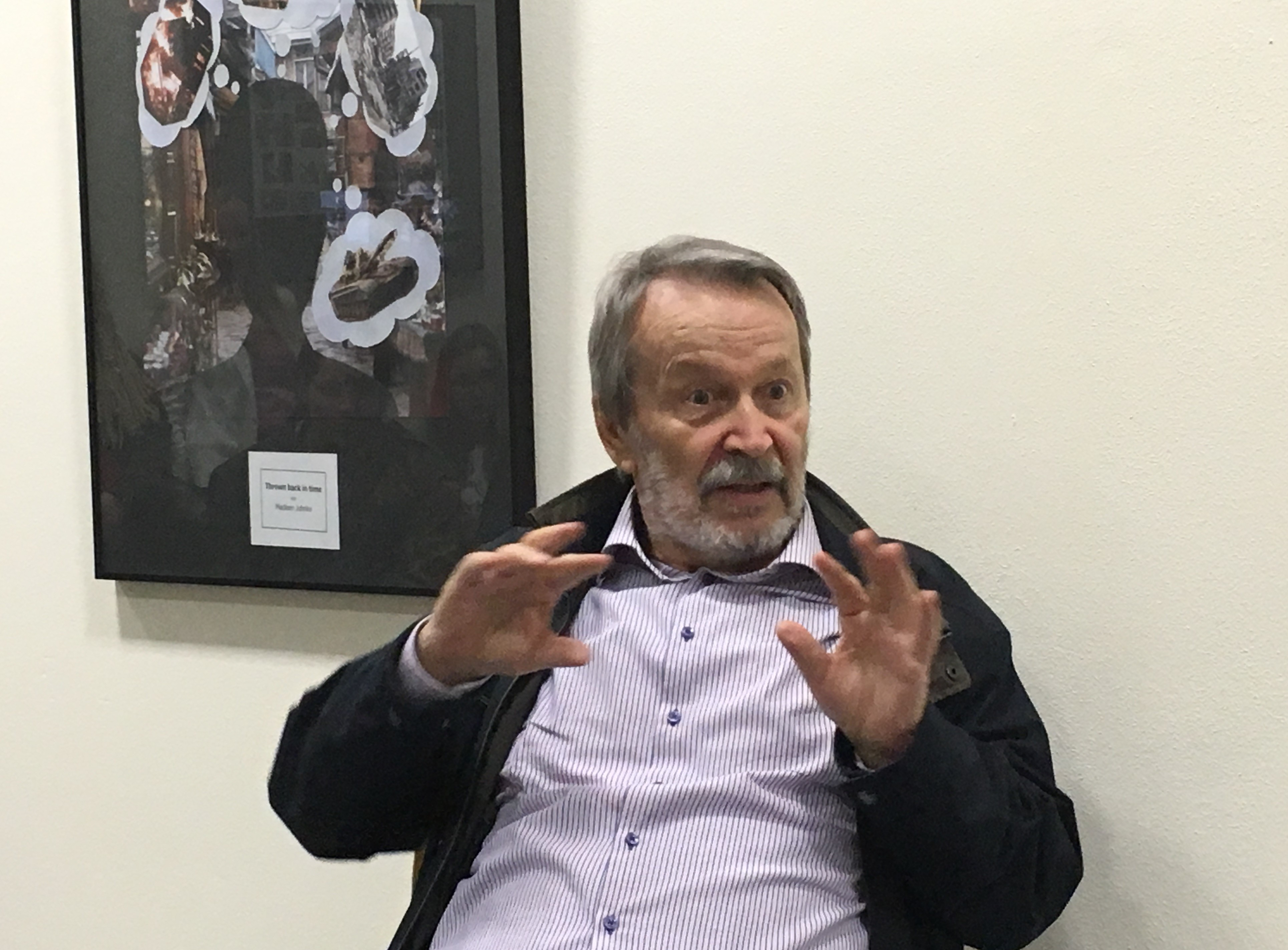 Stevan Tontic während einer Diskussion in der Stadtbibliothek in Oelsnitz im Erzgebirge